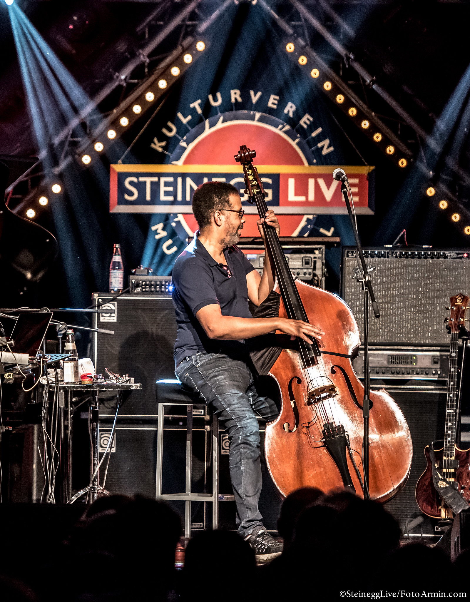 Stanley Clarke beim Steinegg Live Festival 2016 / in Steinegg bei Bozen in Südtirol - Italien.